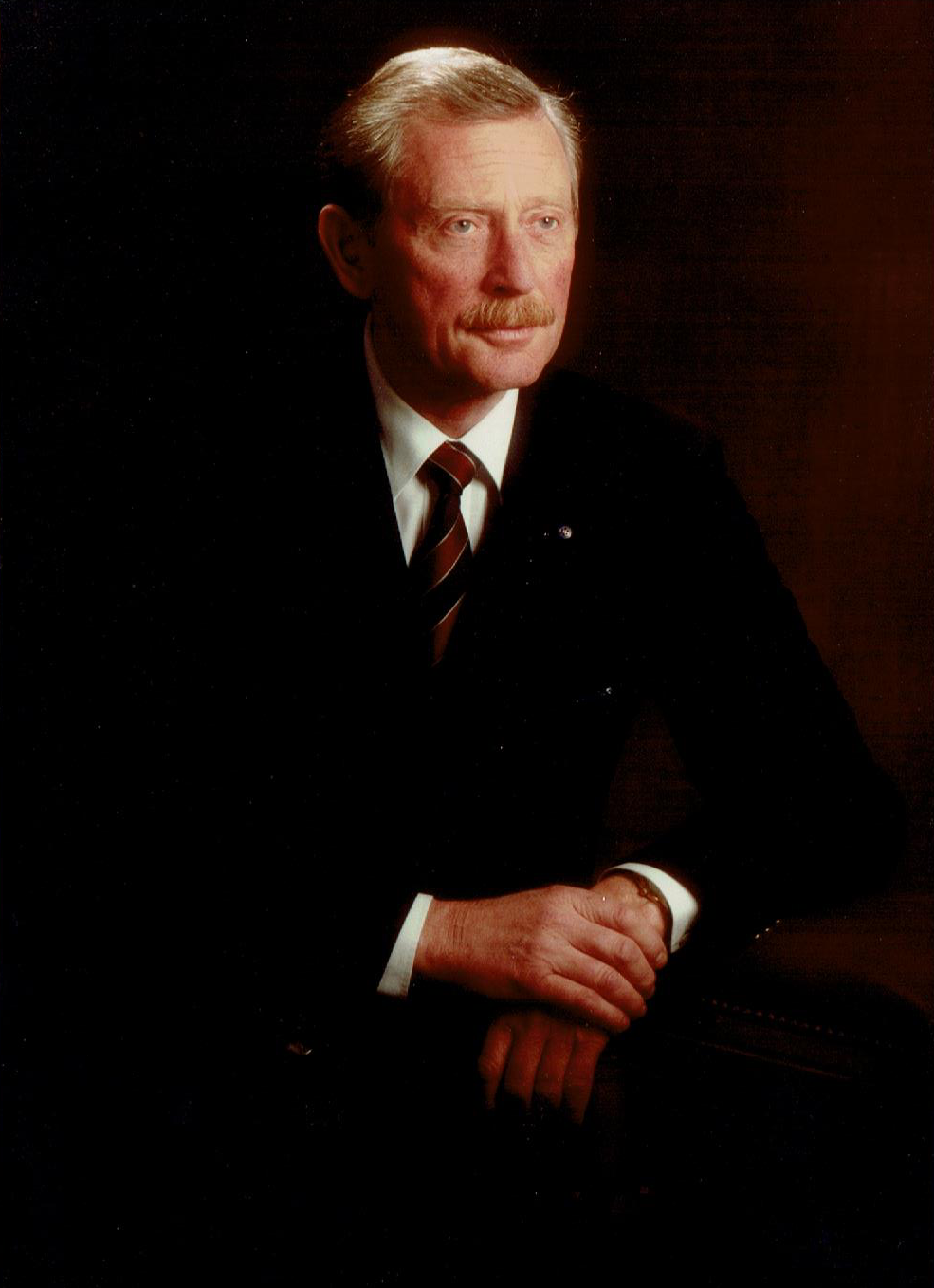 Fotografie des Braunschweiger Chirurgen Prof. Dr. Peter Christian Alnor